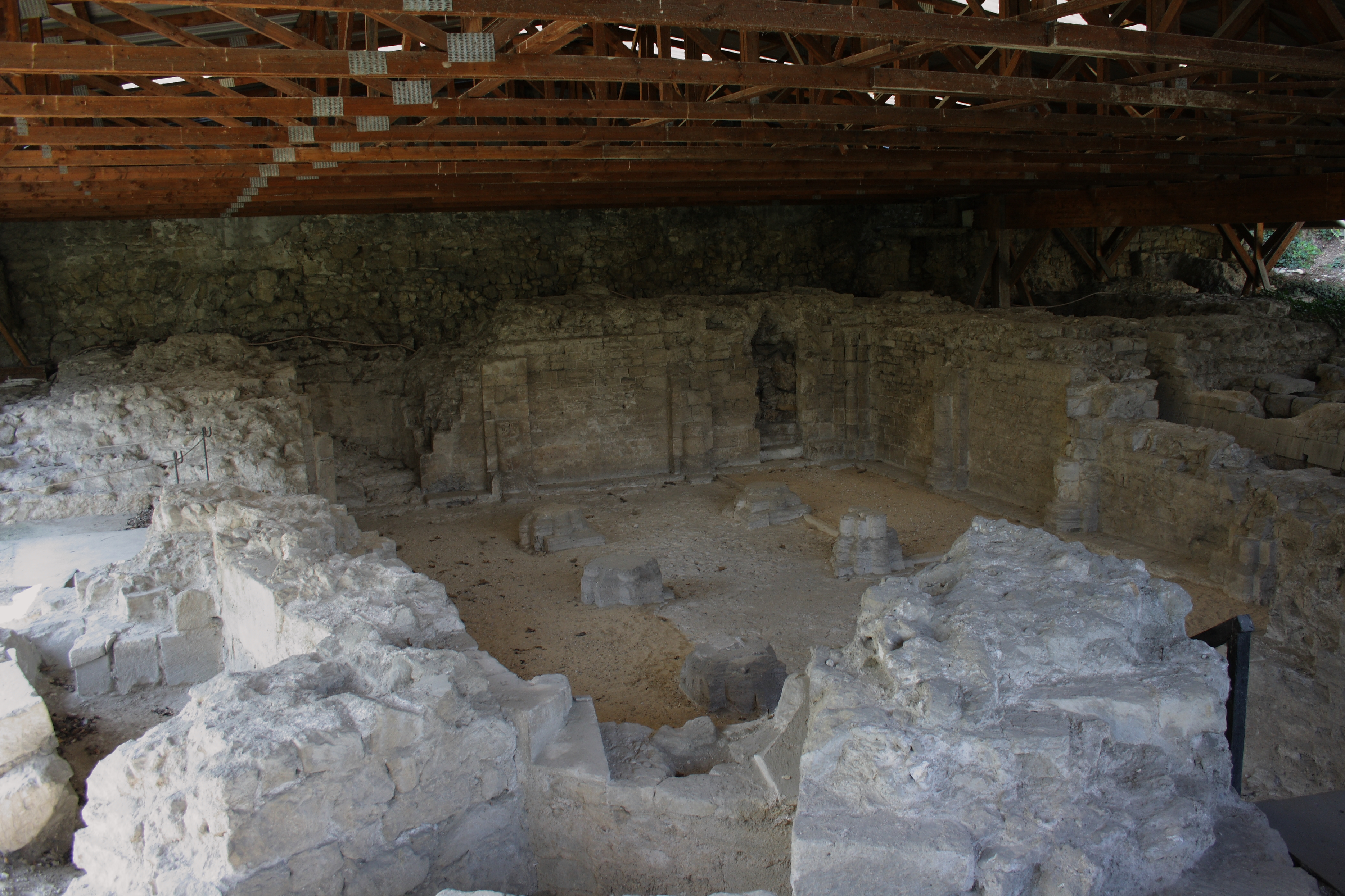 Ausgrabungen der ehemaligen Benediktinerinnenabtei Notre-Dame in Argenteuil im Département Val-d’Oise (Île-de-France/Frankreich)